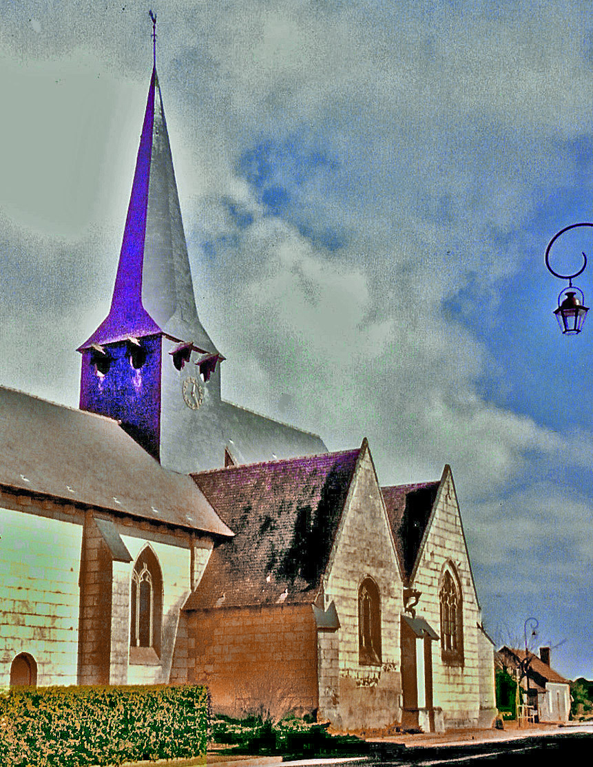 12è 16è siècle .